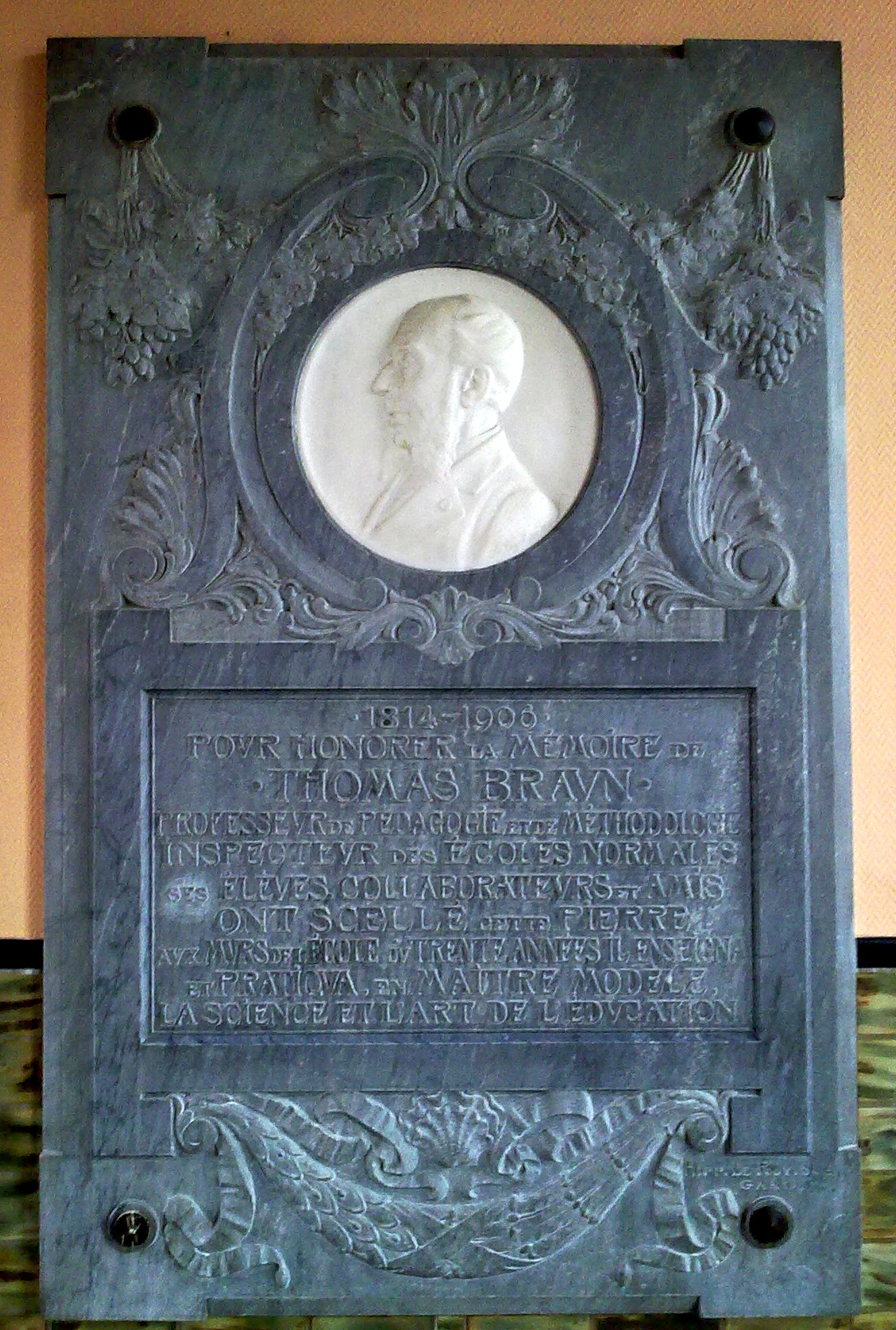 Stèle en Hommage a Thomas Braun Senior à l'école Normale de Nivelles (IESP en 2011) érigée en 1908.